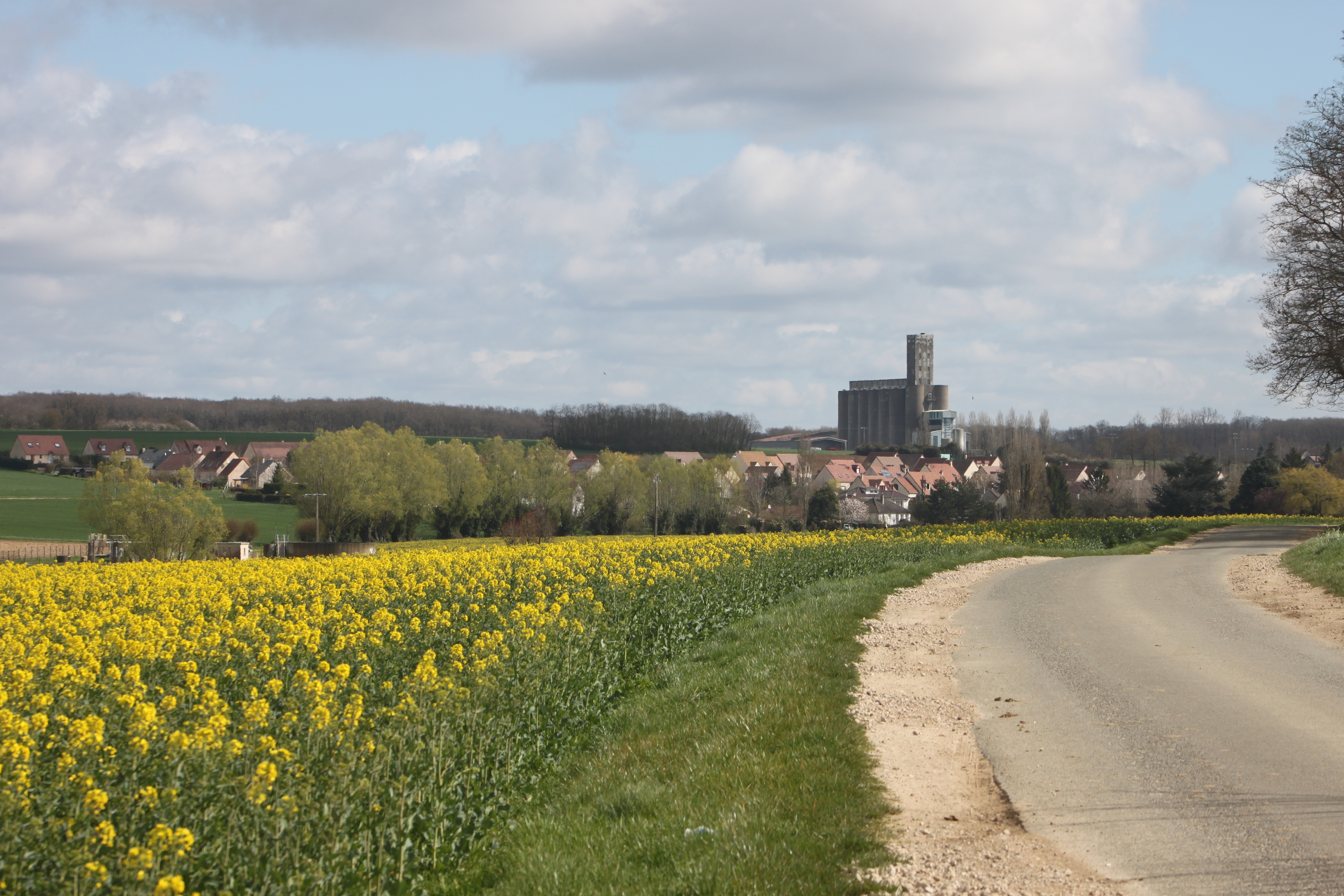 Vue sur Gas (sur la D329-4 reliant Yermenonville à Gas)